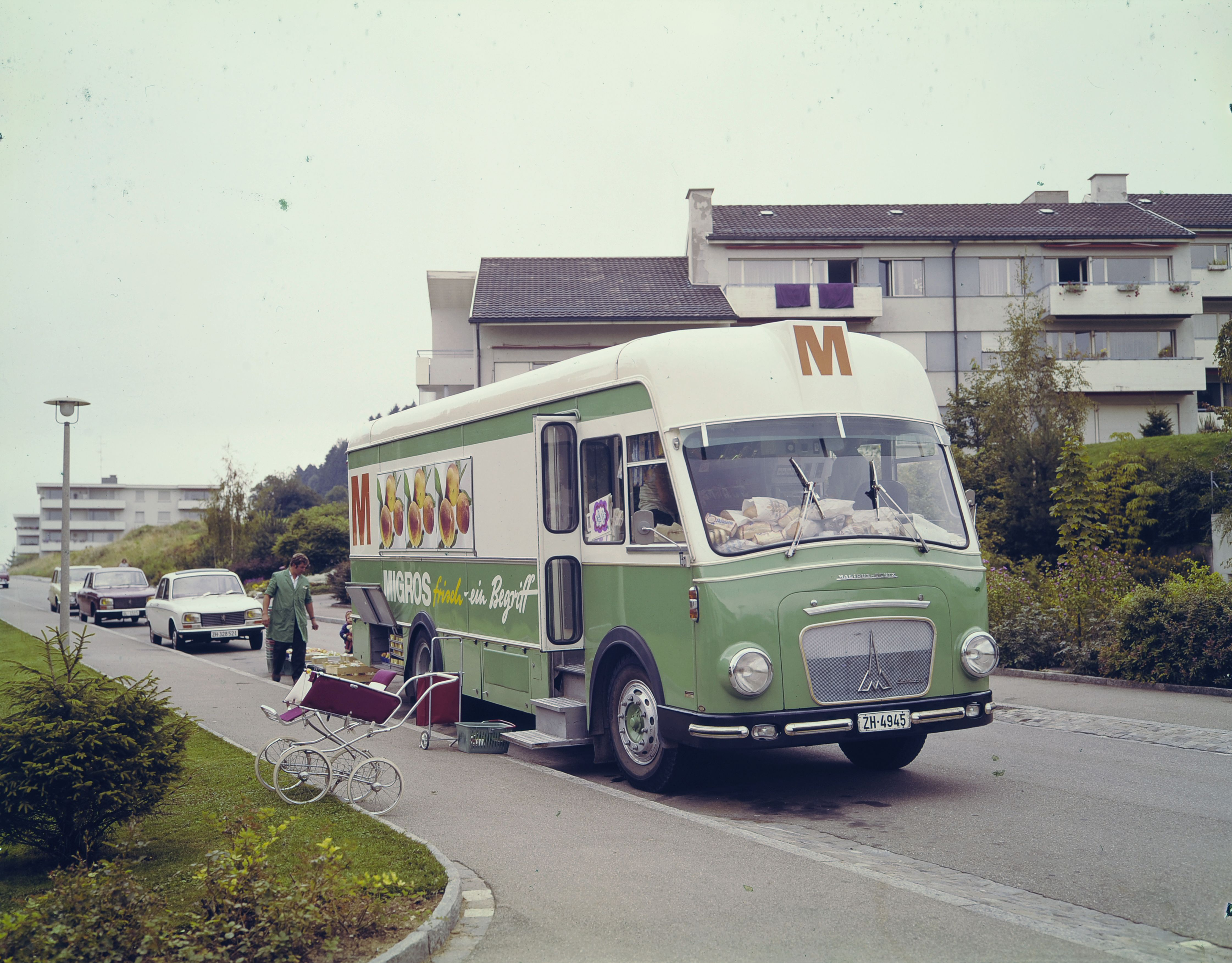 Migros-Verkaufswagen Magirus-Deutz, stehend, mit Chauffeur/Verkäufer